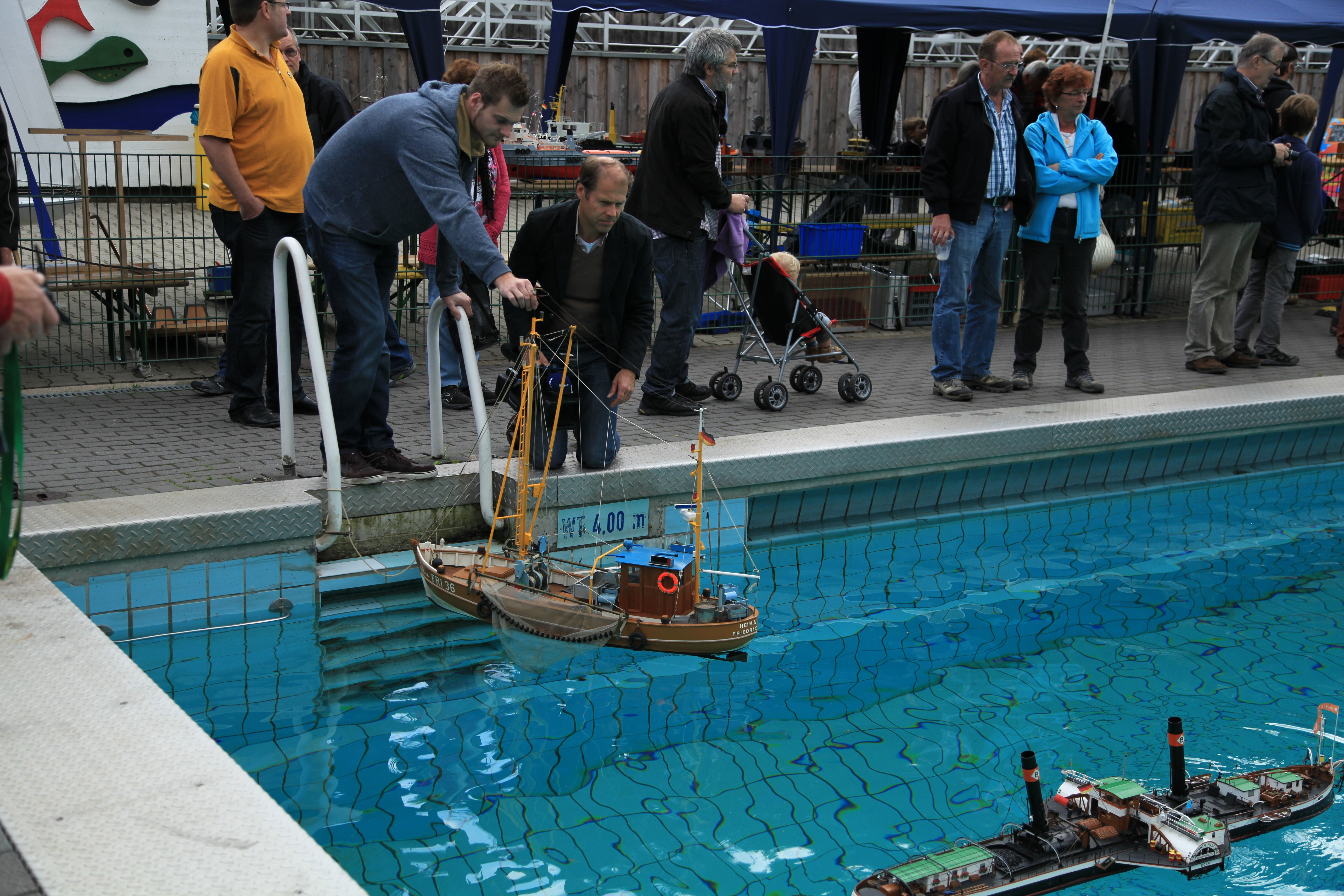 Schiffsparade 2012 im Freibad Eschbachtal in Remscheid